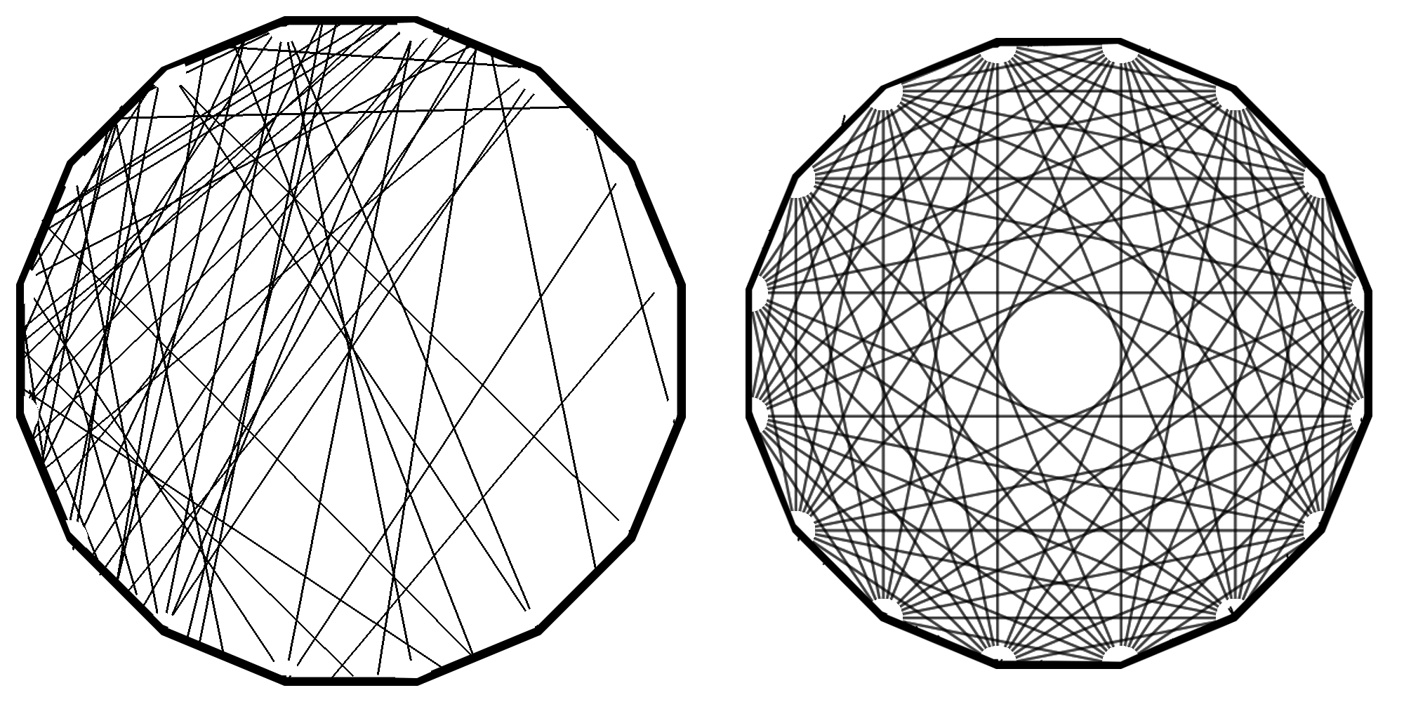 An image showing the difference between complexity (a) and orderliness (b).